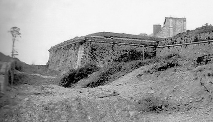 Fort Keranroux 1944